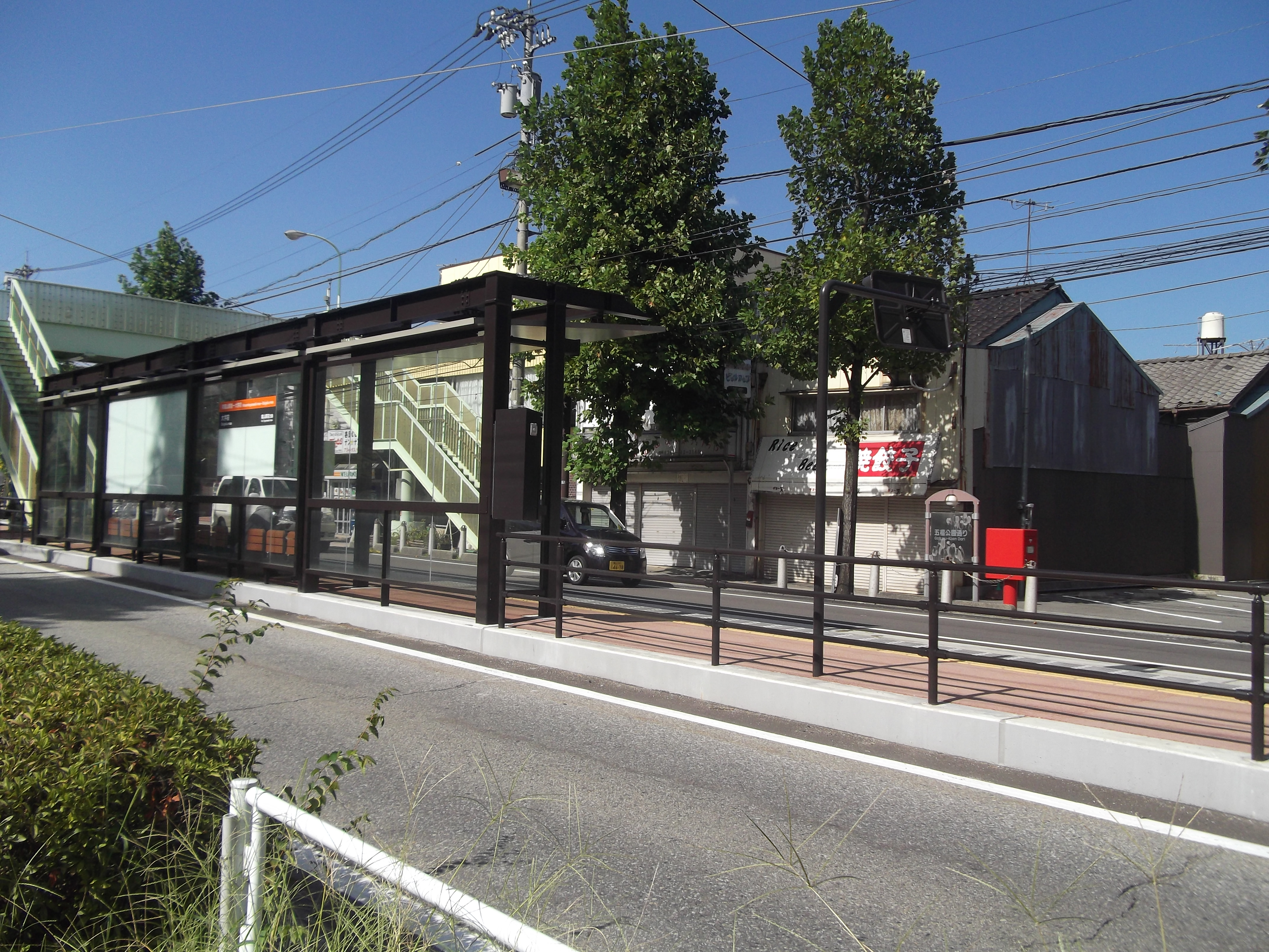 富山市内軌道線大学前駅